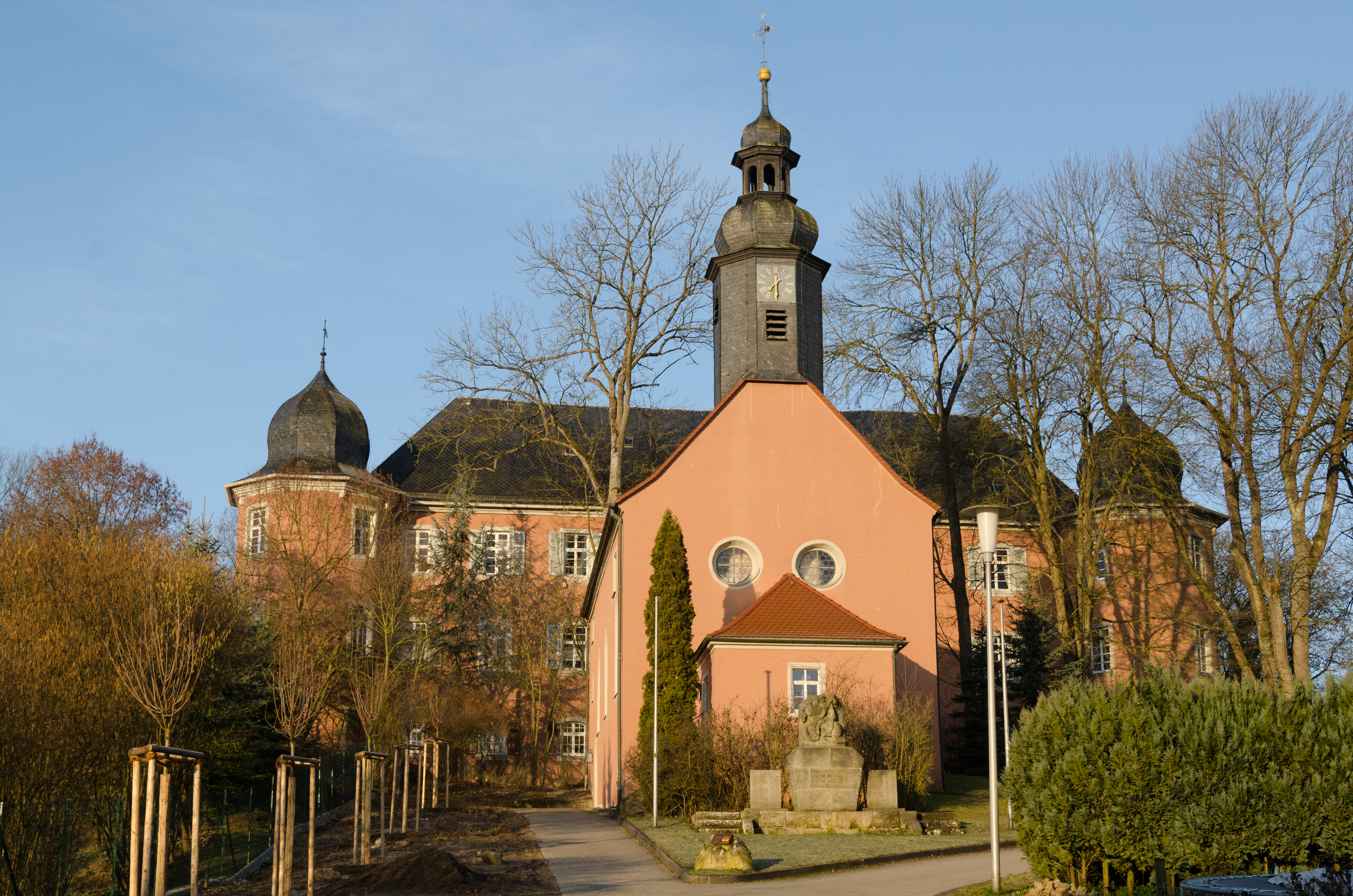 Saal an der Saale, Waltershausen, Kirche und Schloß